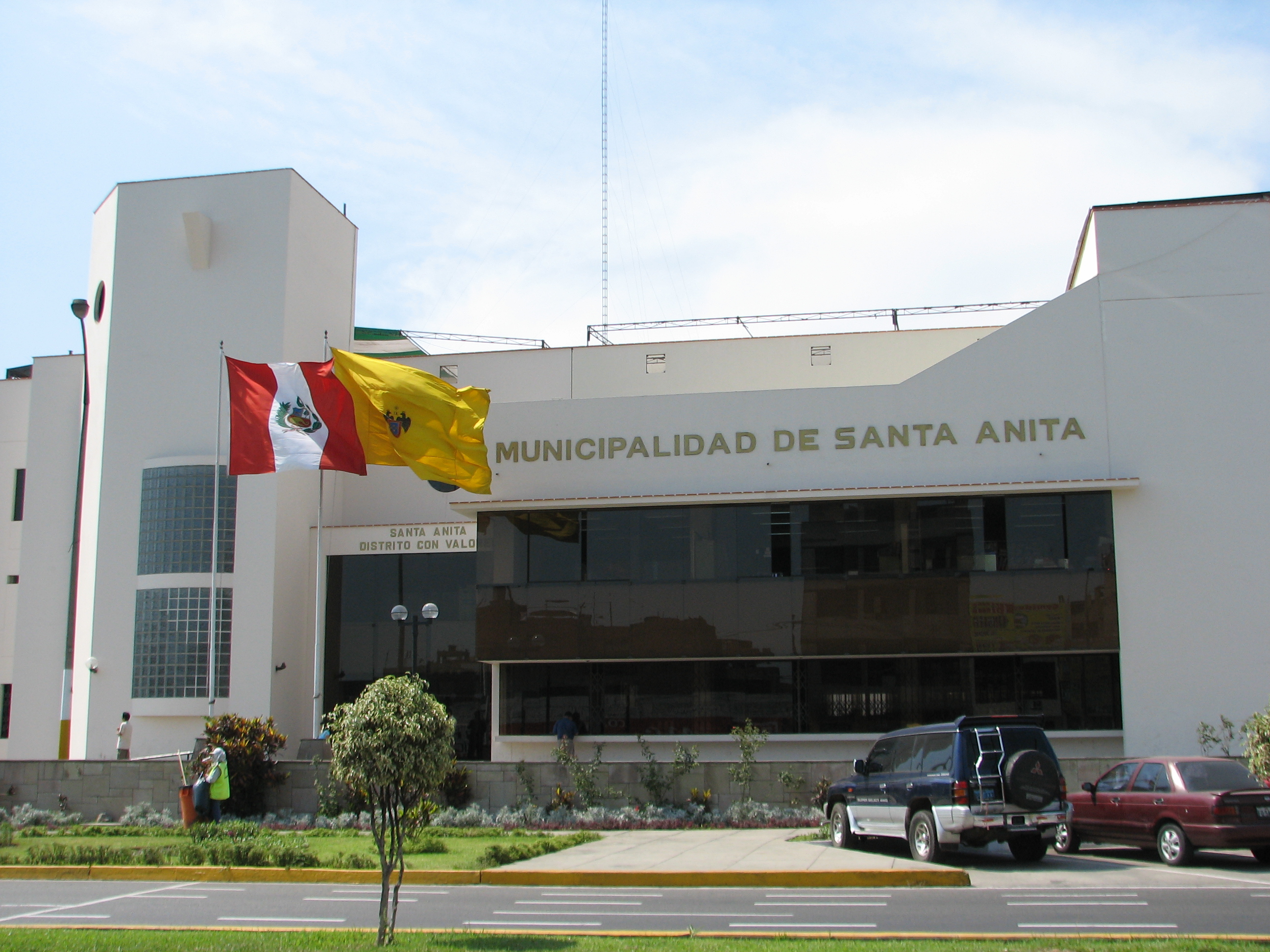 Municipalidad, Santa Anita/Lima, Peru.jpg